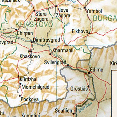 Swilengrad - Lage des Ortes in Bulgarien